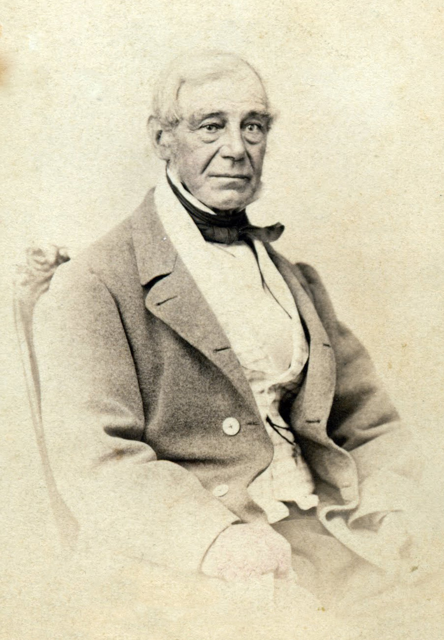 Charles C. Wood Taylor conocido en Chile como Carlos Wood Taylor (Liverpool, 25 de abril de 1792 - † Londres, 19 de febrero de 1856) Pintor, ingeniero, marino y militar británico que se radicó en Chile. Diseñó el Escudo Nacional de Chile, adoptado por el gobierno en 1834, incorporando al huemul y el cóndor. Diseñó además los primeros sellos del naciente Estado. Es considerado uno de los artistas extranjeros que más influyeron en la configuración de una pintura moderna chilena.